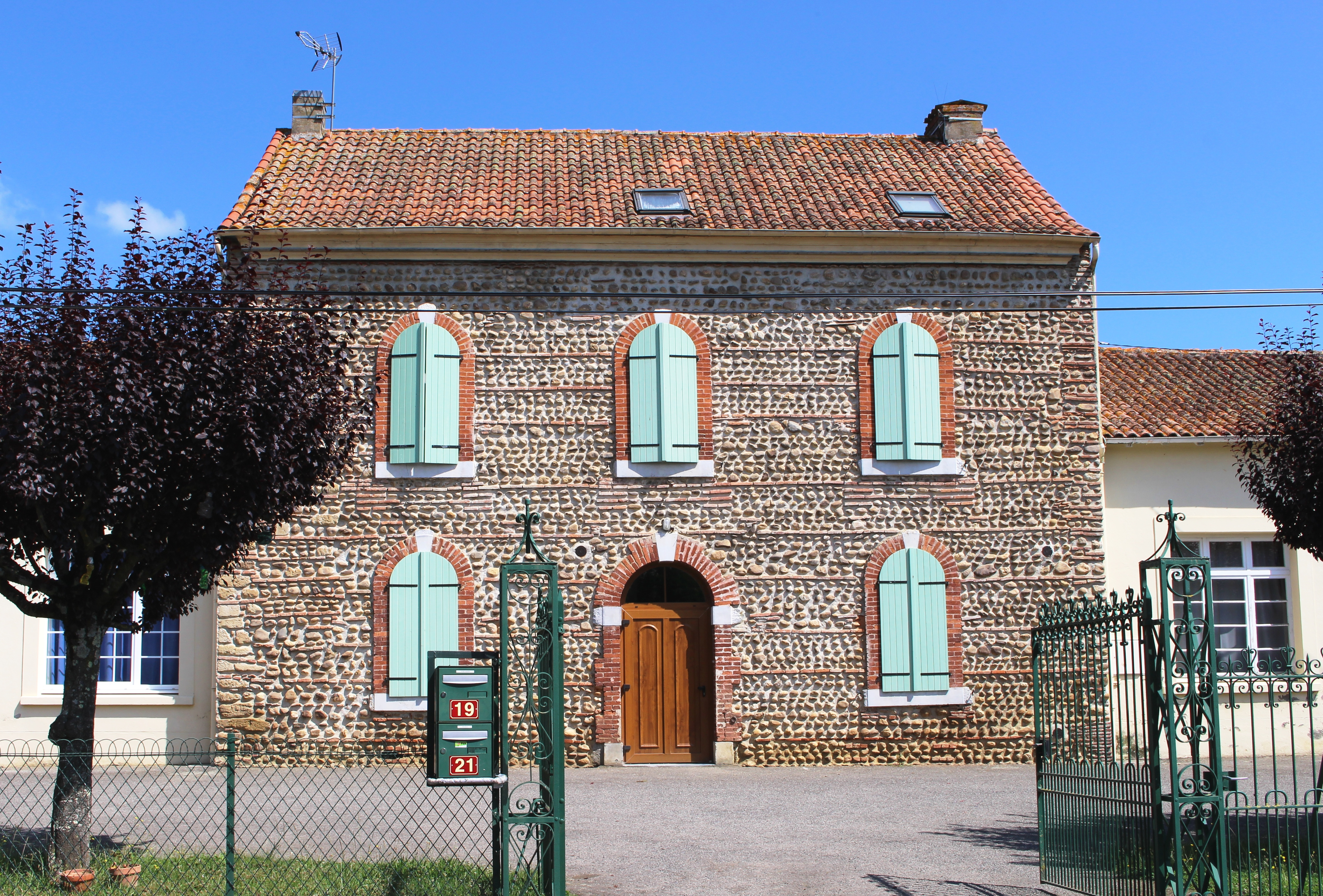 École de Bonnefont (Hautes-Pyrénées)